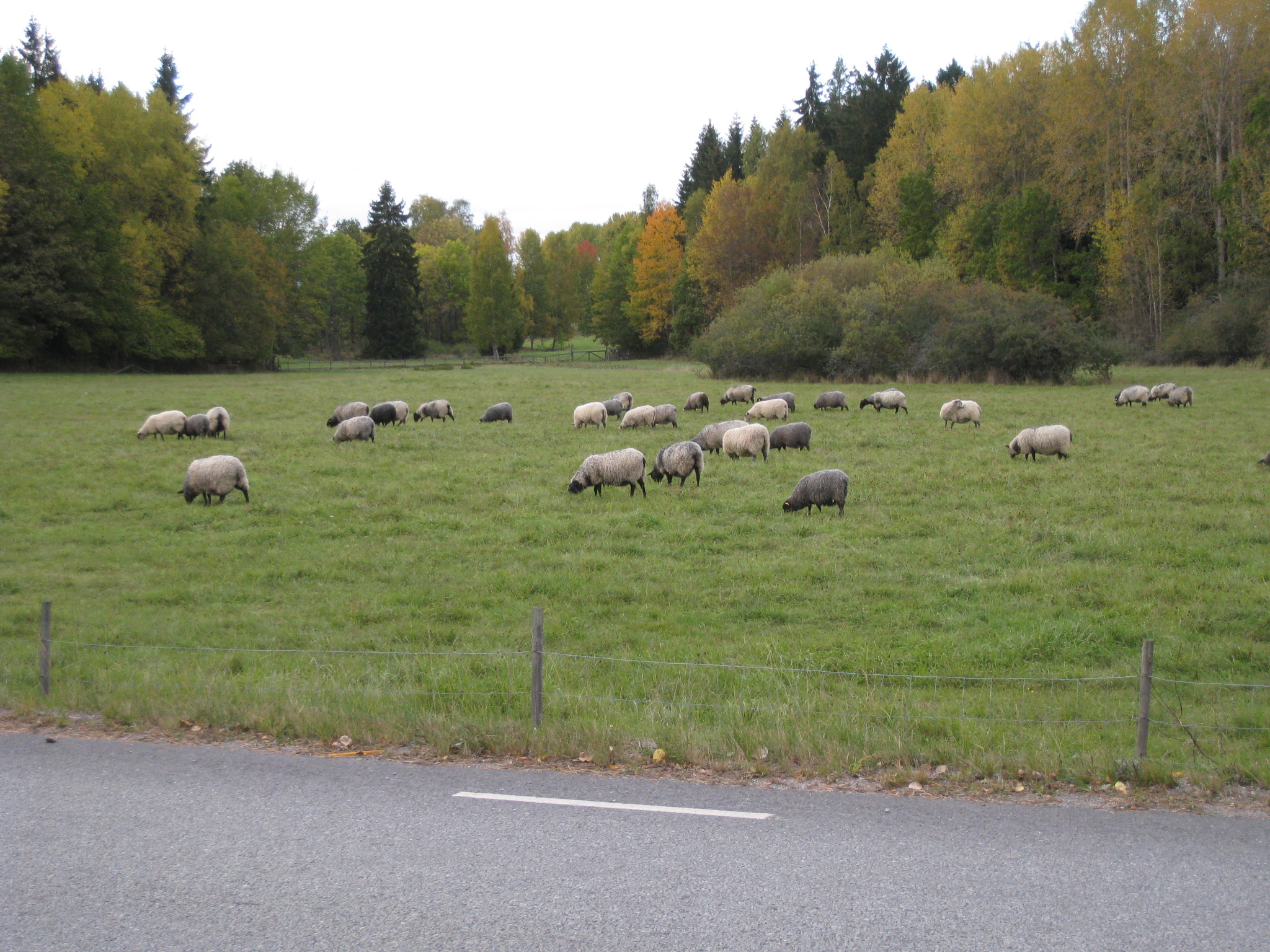 Högby vid Råstensvägen, Viksjö, Järfälla, Stockholms län. Fårbete.